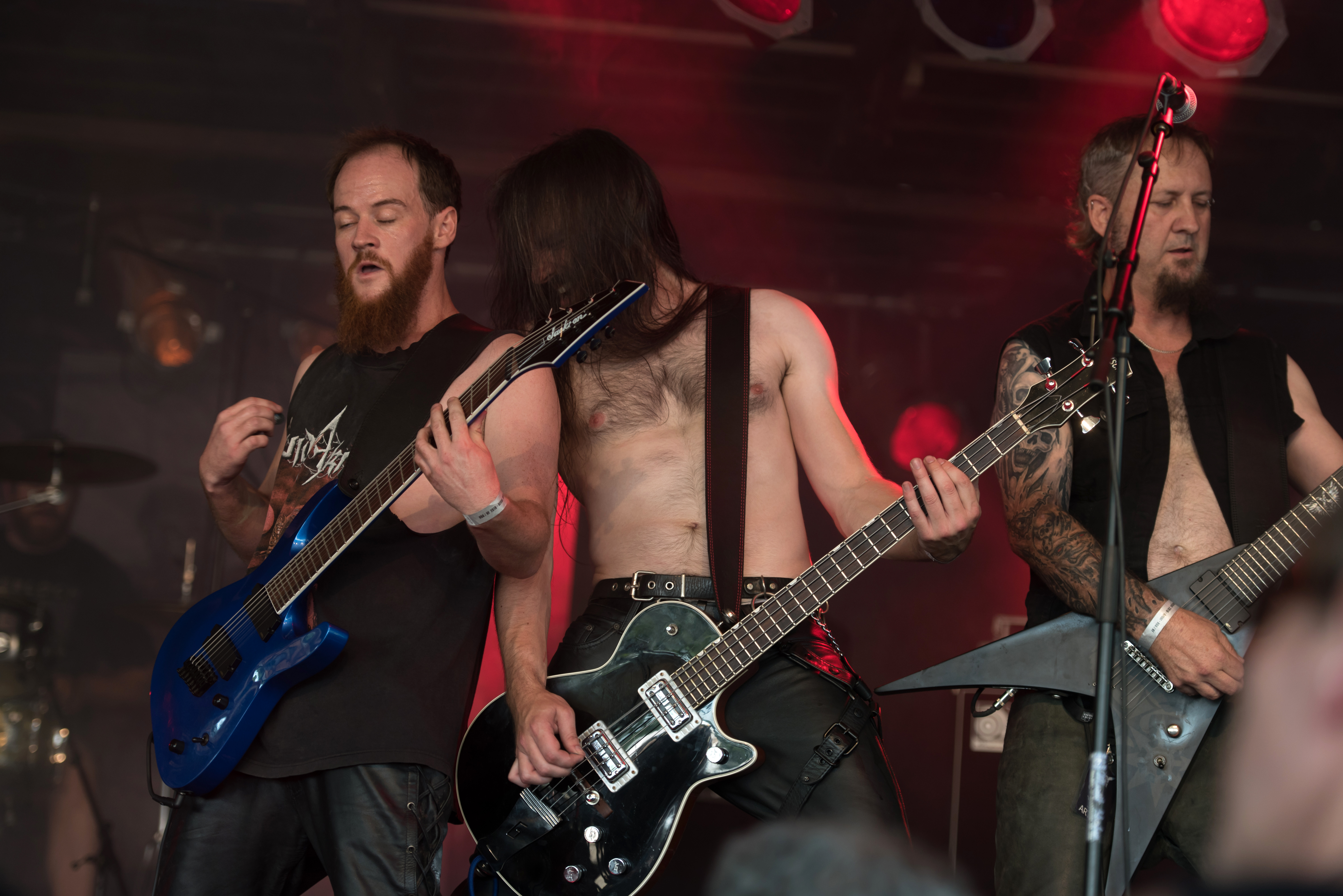 Claim the Throne beim Hörnerfest 2018